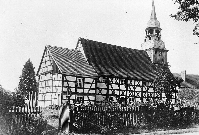 Original image description from the Deutsche Fotothek Boxberg/O.L.-Merzdorf. Dorfkirche, 1934 wegen Baufälligkeit abgetragen (RA Görlitz, Bildersammlung)